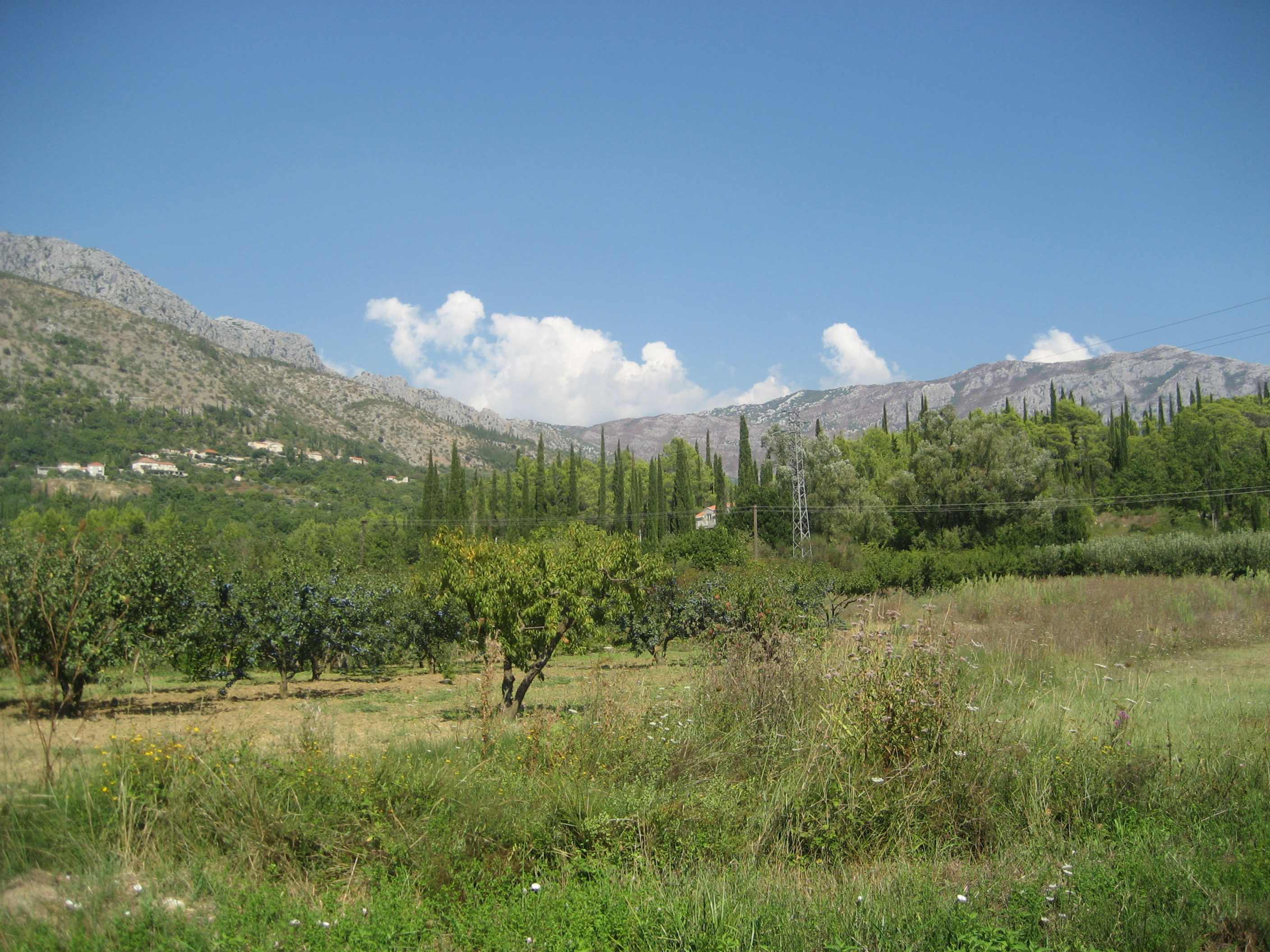 Konavle, Landscape